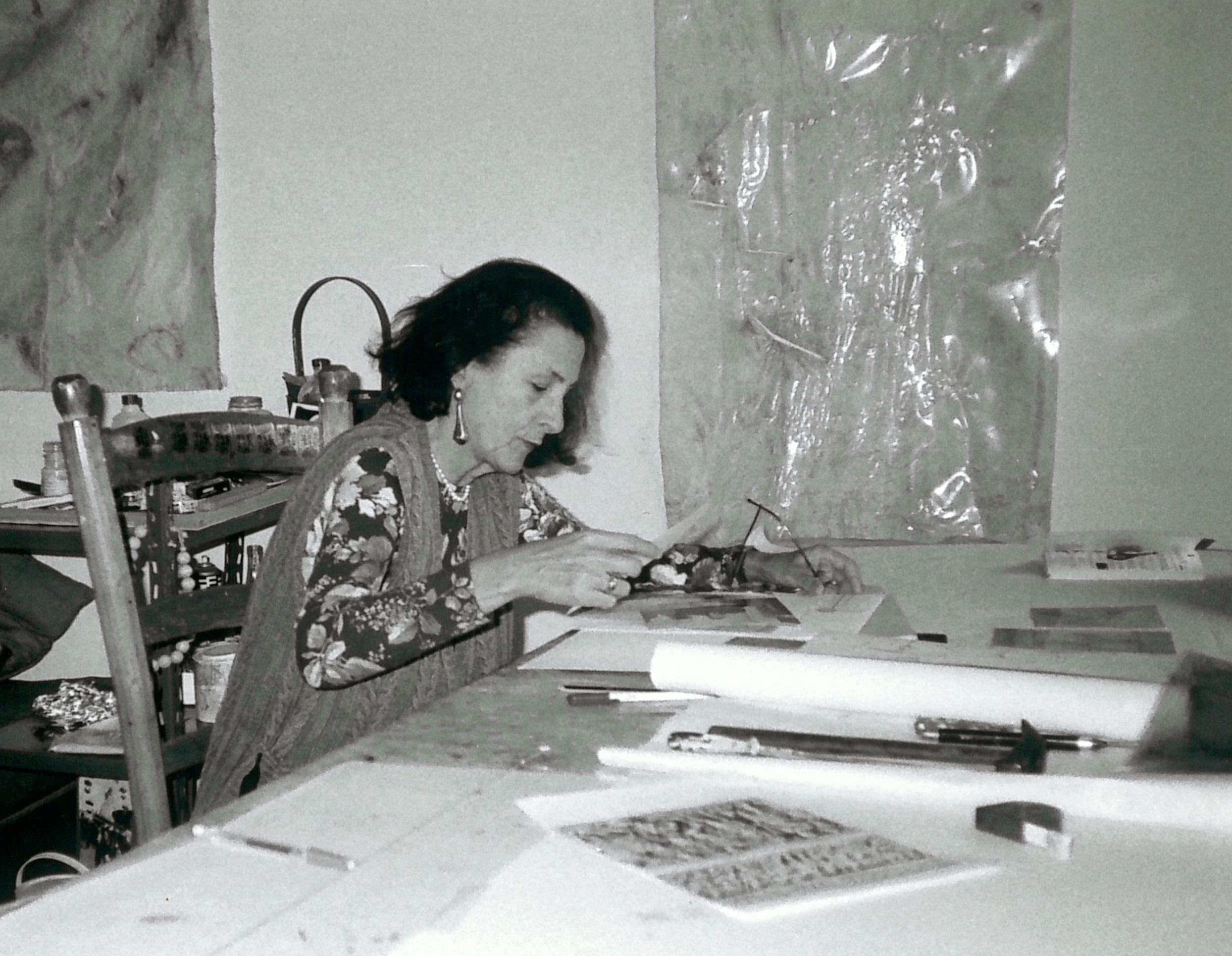 Anna Rossettini al lavoro nel proprio studio